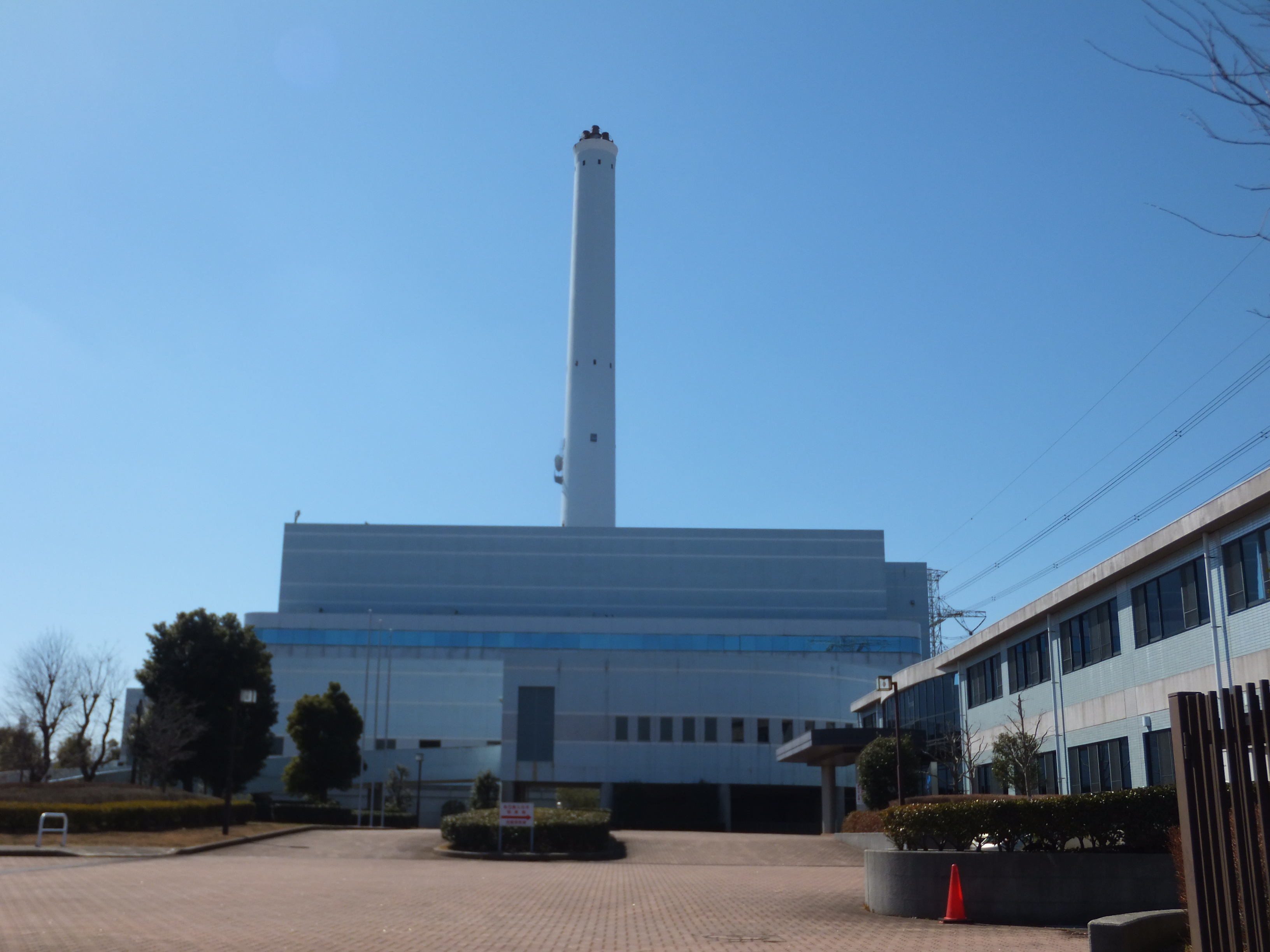 千葉市環境局、千葉北清掃工場（千葉市花見川区）